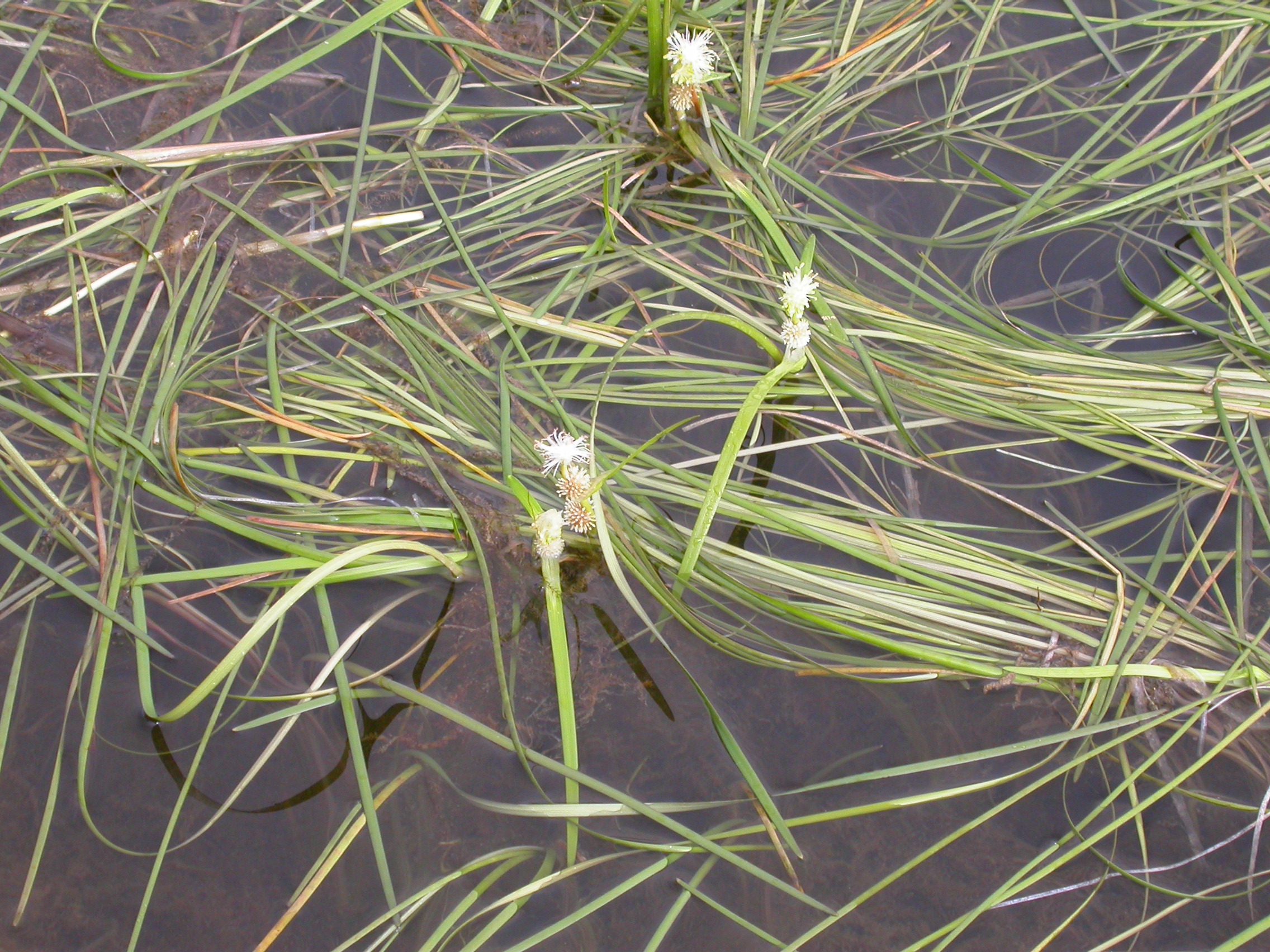 Sparganium angustifolium Zermatt, Riffelberg (Kanton Wallis, Switzerland), 2500 m Author: Barbara Studer – own photograph Date: 2.08.06